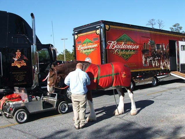 Clydesdale